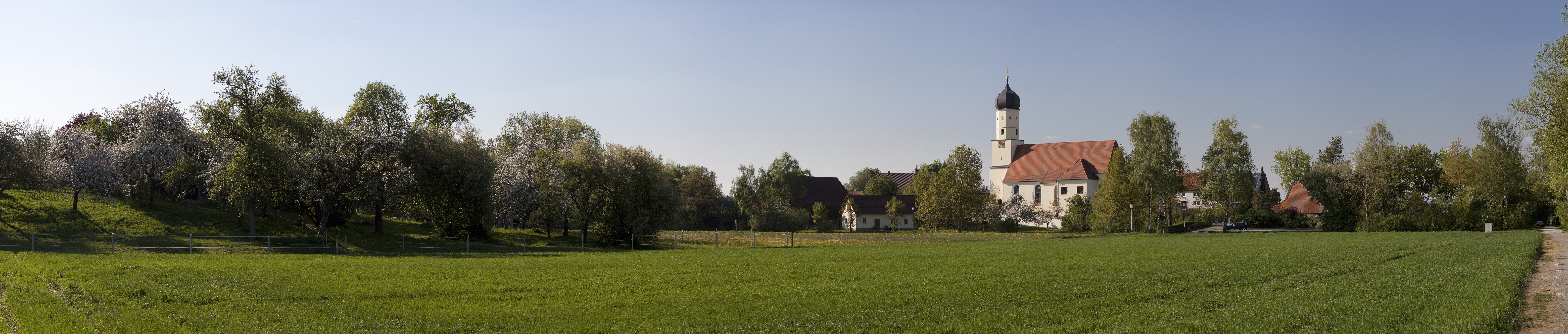 Die Niederkirch in Untersulmetingen, einem Ortsteil von Laupheim.